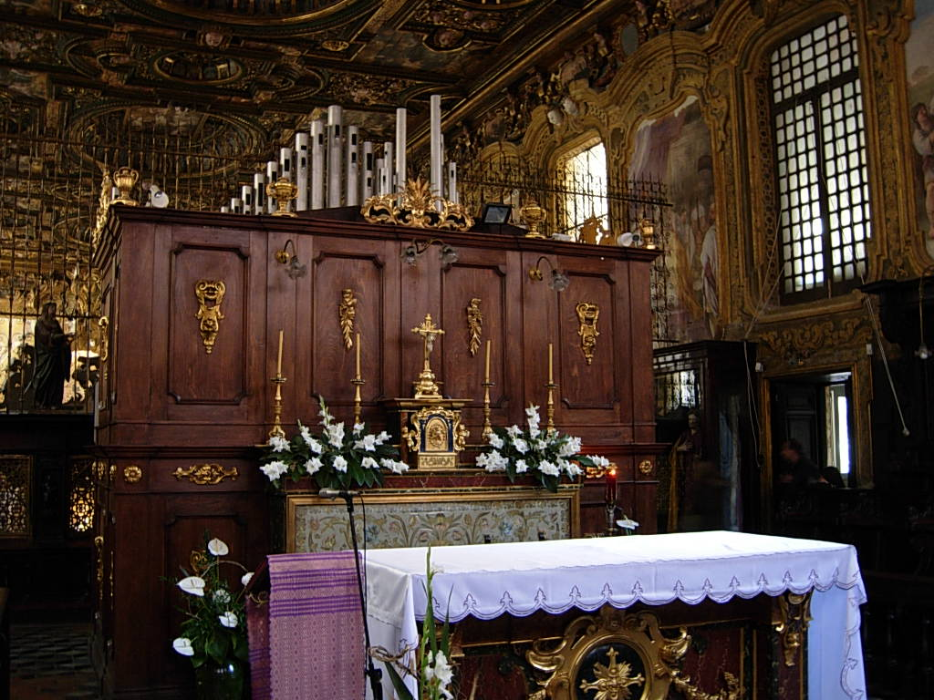 Coro delle monache in San Gregorio Armeno in napoli Foto personale